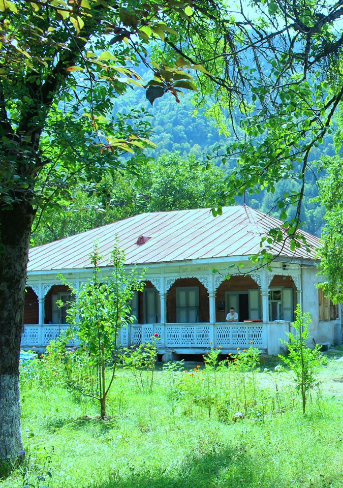 ზურაბ მაისაშვილის ოდა სახლი ზაფხულში